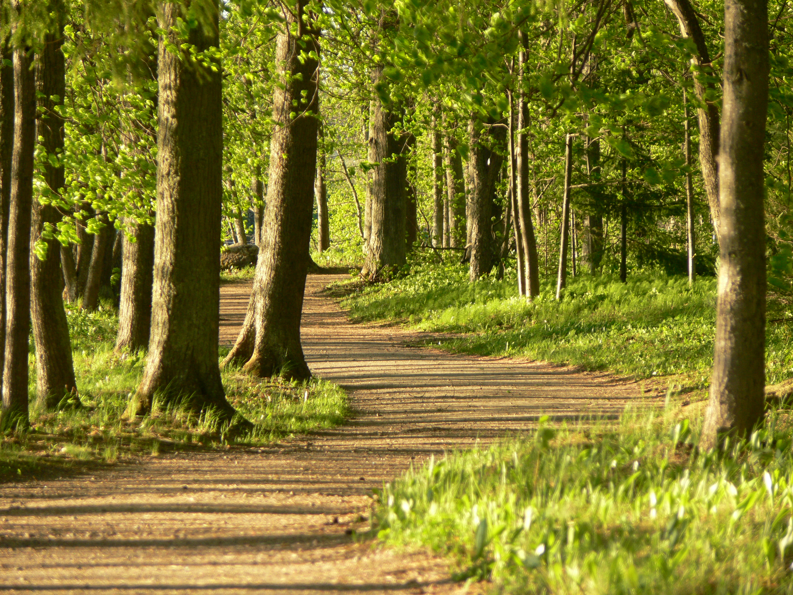 Räpina linn, Põlvamaa